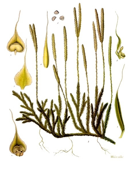 Bärlapp. A Pflanze in natürlicher Grösse; 1 u. 2 Stamm- und Zweigblatt, vergrössert; 3 Fruchtblatt von der Rückseite, desgl.; 4 dasselbe von der Innenseite mit Sporangium, desgl.; 5 Sporen, desgl.; 6 u. 7 Fruchtblatt mit vollständig geöffnetem und entleertem Sporangium von verschiedenen Seiten, desgl.